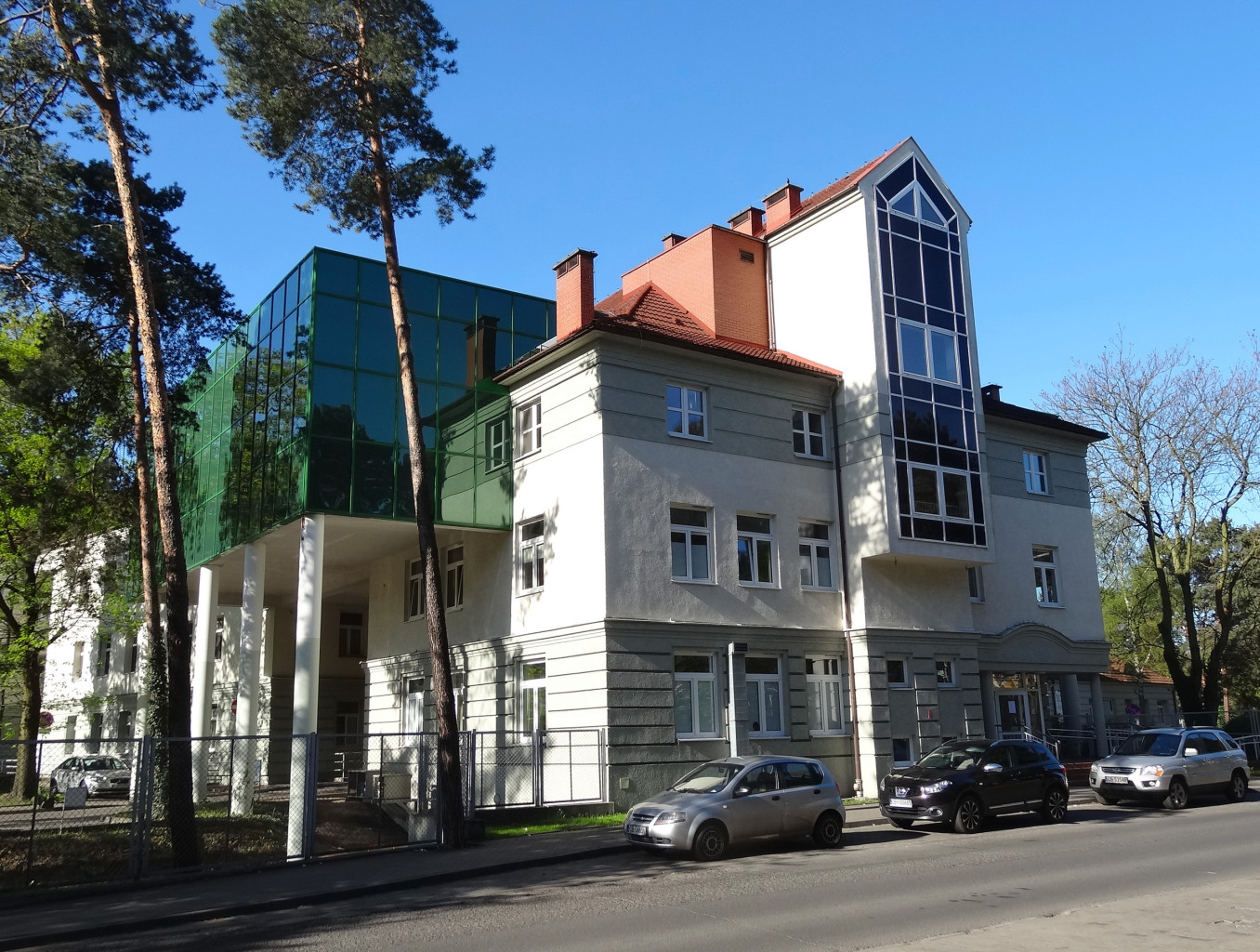 Wielospecjalistyczny Szpital Miejski im. dr. Emila Warmińskiego w Bydgoszczy przy ul. Szpitalnej 19